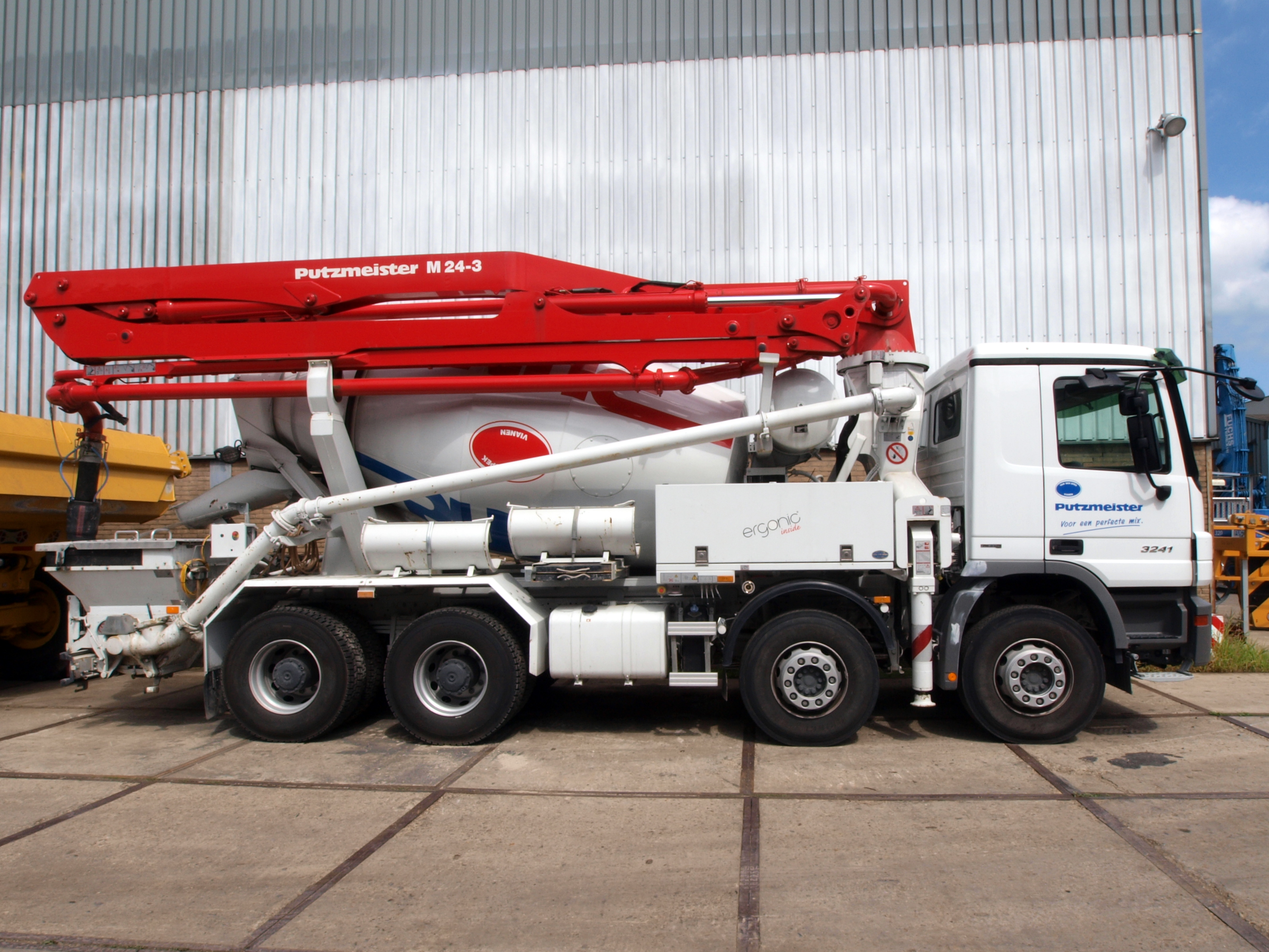 Mercedes Benz 3241 Putzmeister.